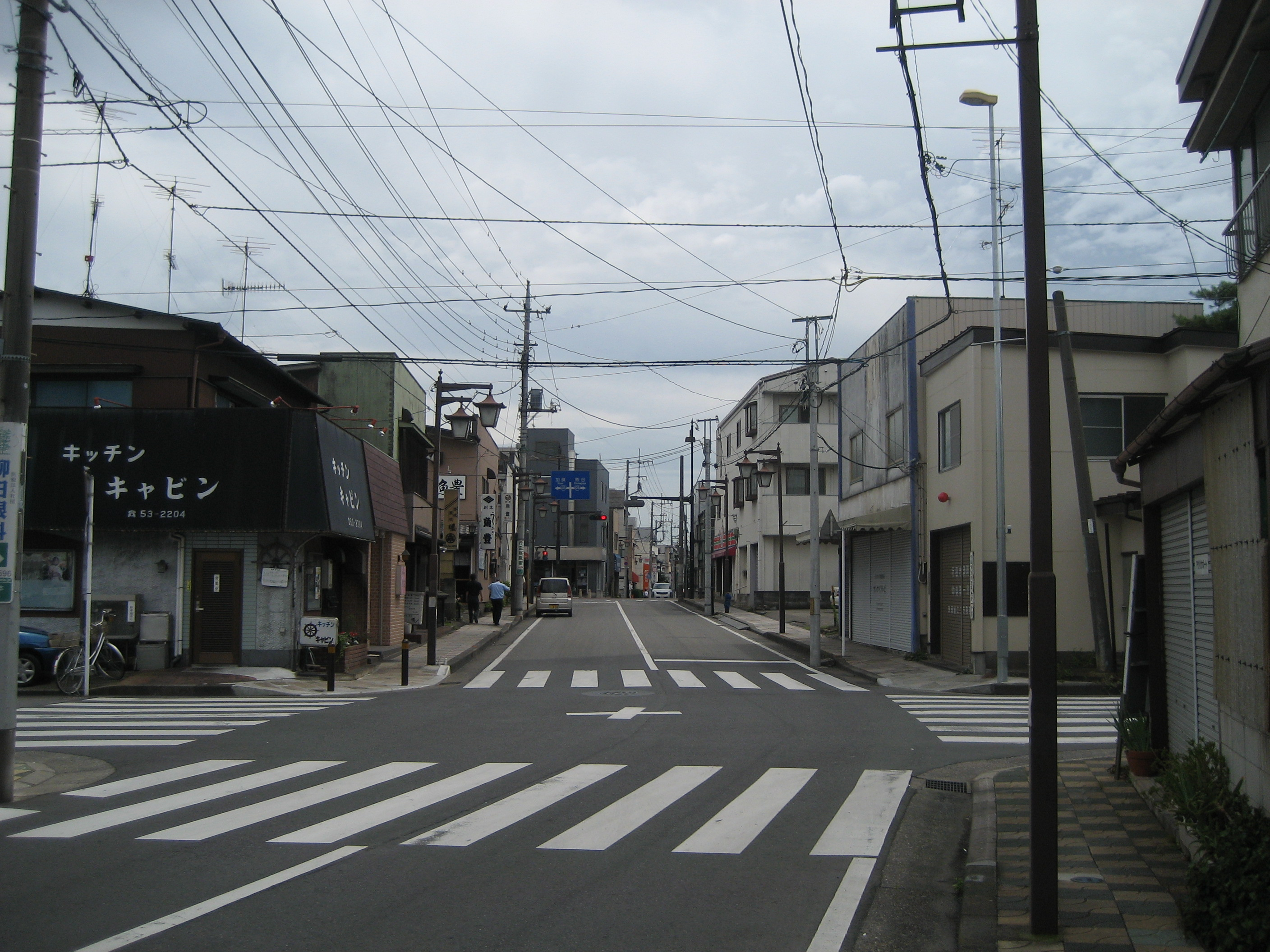 埼玉県道198号線行田市内